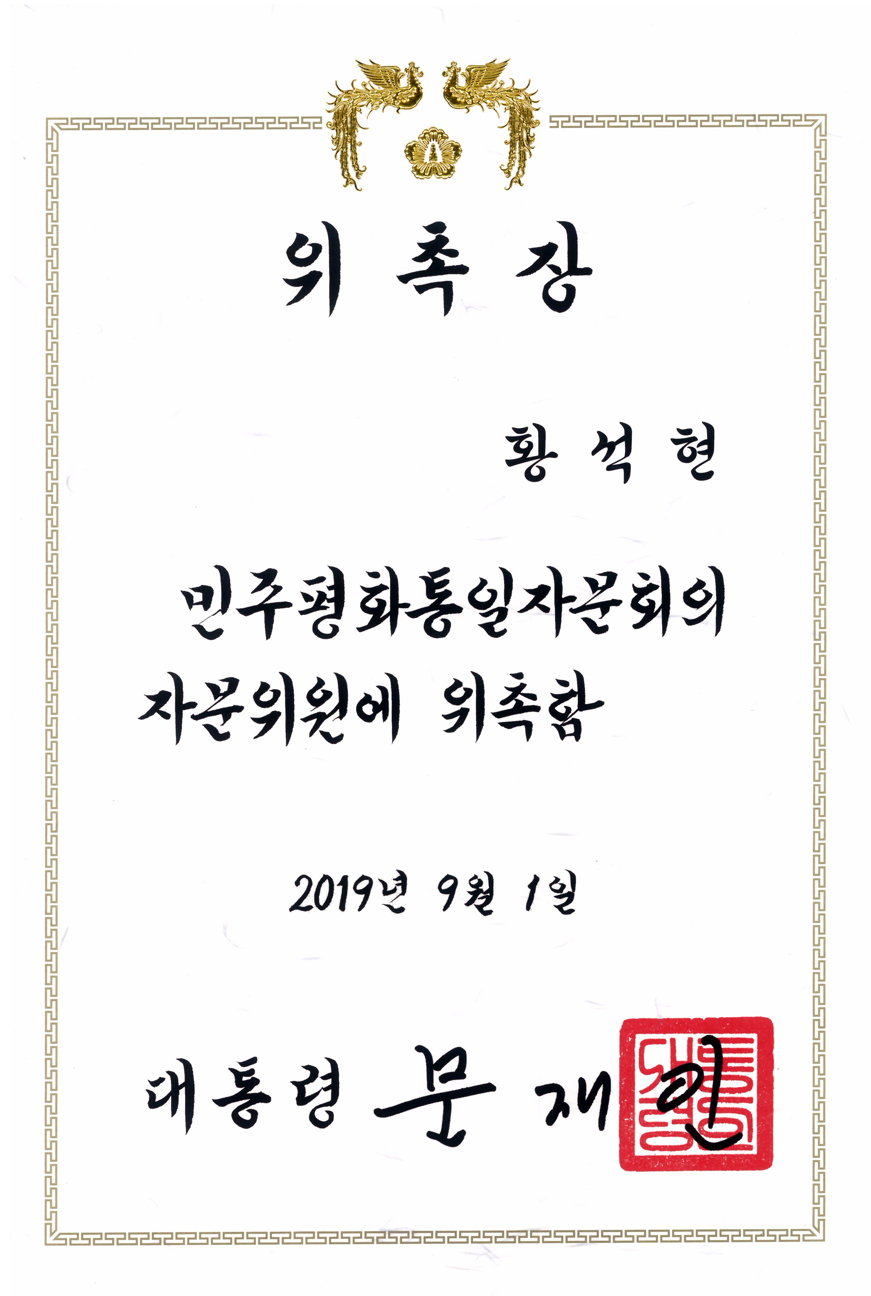 2019년 9월 황석현 수필가 민주평통 자문위원 위촉